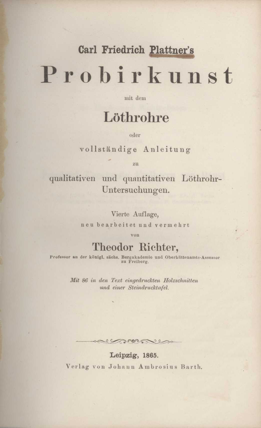 Titelblatt: Carl Friedrich Plattner, Probirkunst mit dem Löthrohre, 4 Auflage